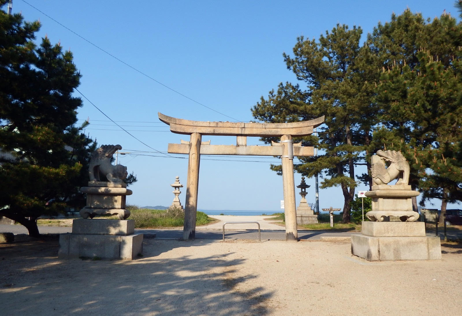 綱敷天満神社の海側